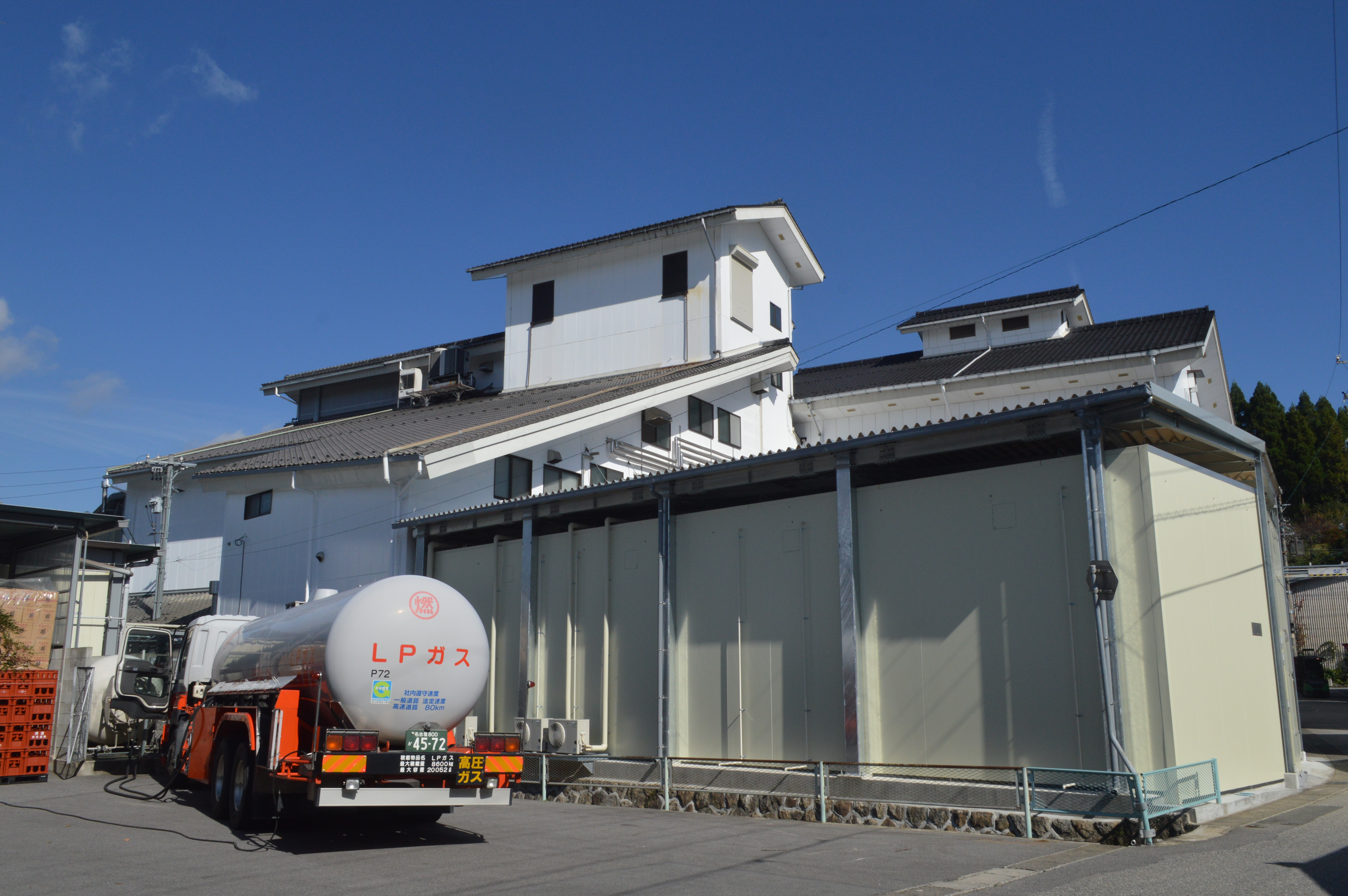 愛知県北設楽郡設楽町にある関谷醸造。